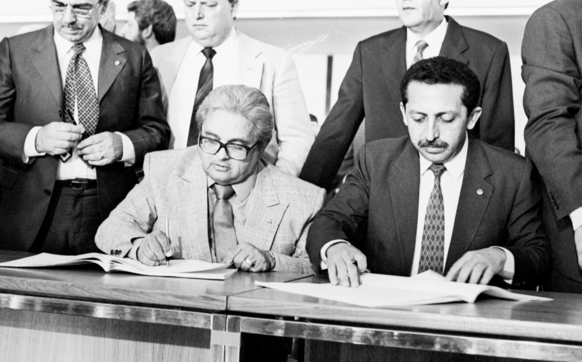 Assinatura da Constituição em 29/09/1988. Participantes - Senador Aureo Mello. Foto: Célio Azevedo.